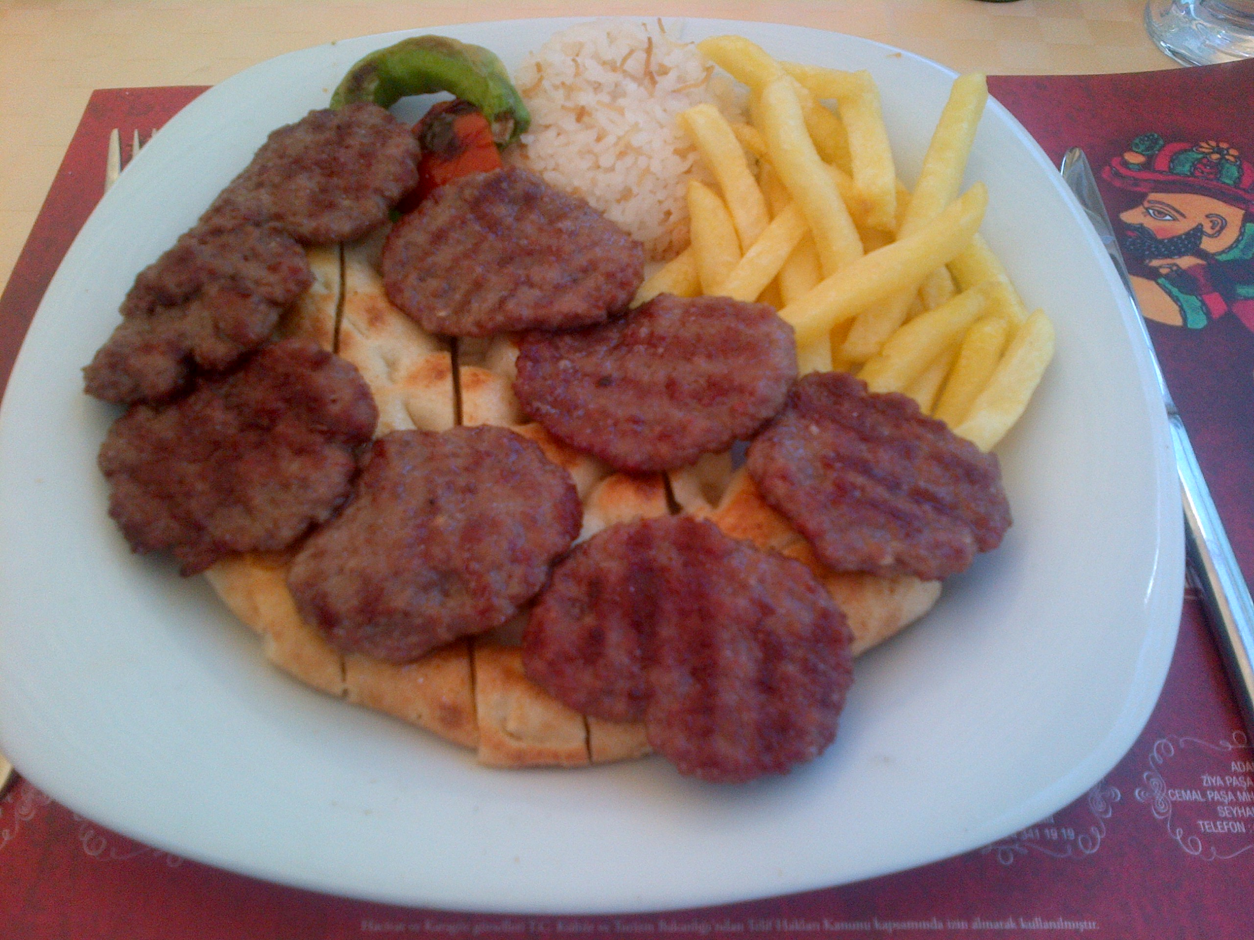 "Köfte" a la parrilla de la cocina turca, acompanado de patatas fritas, "pilav" de arroz con cabellos de angel, un tomate y un pimiento verde asados, sobre una cama de pide.